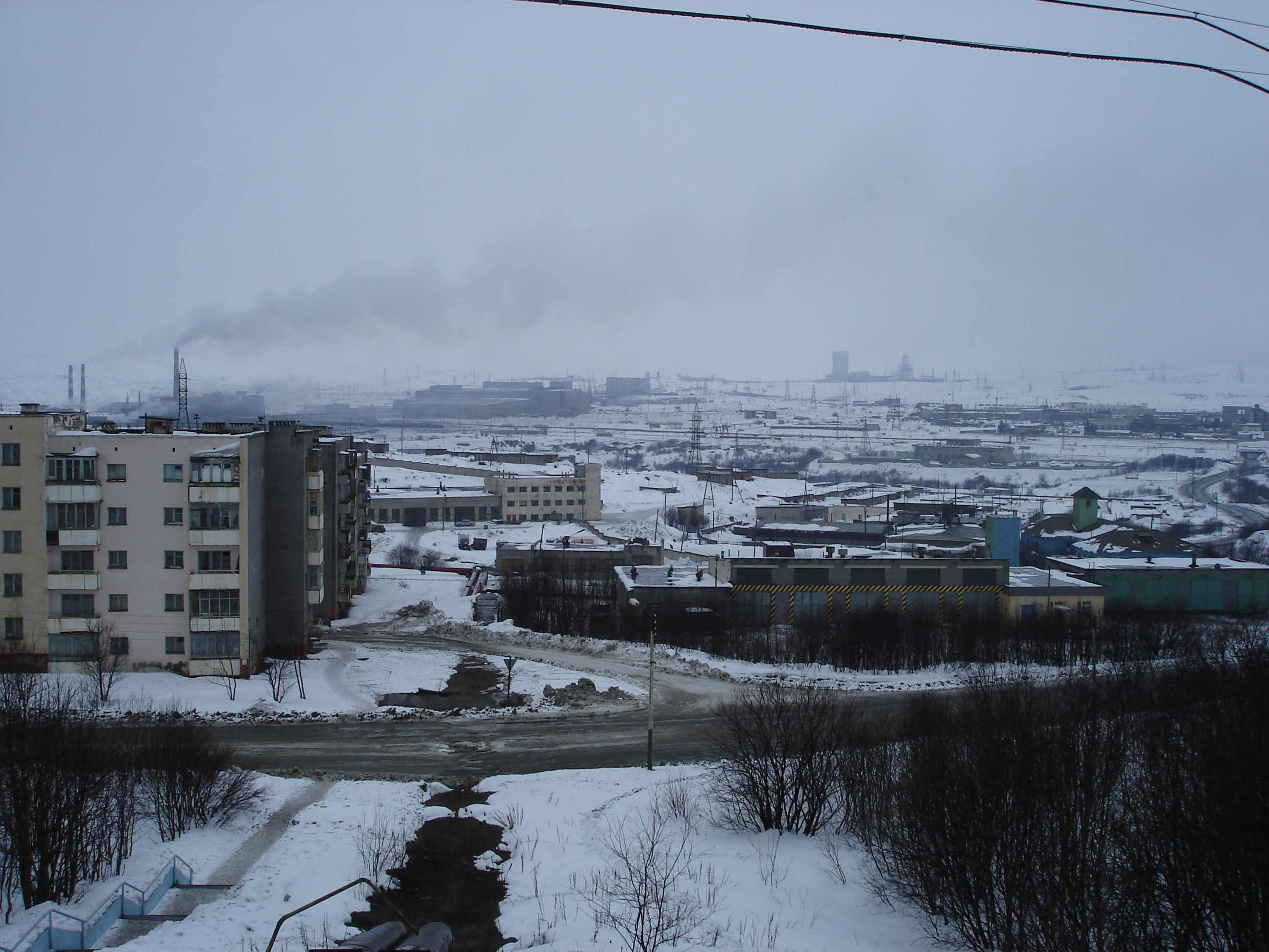 Заполярный: Вид на промплощадку